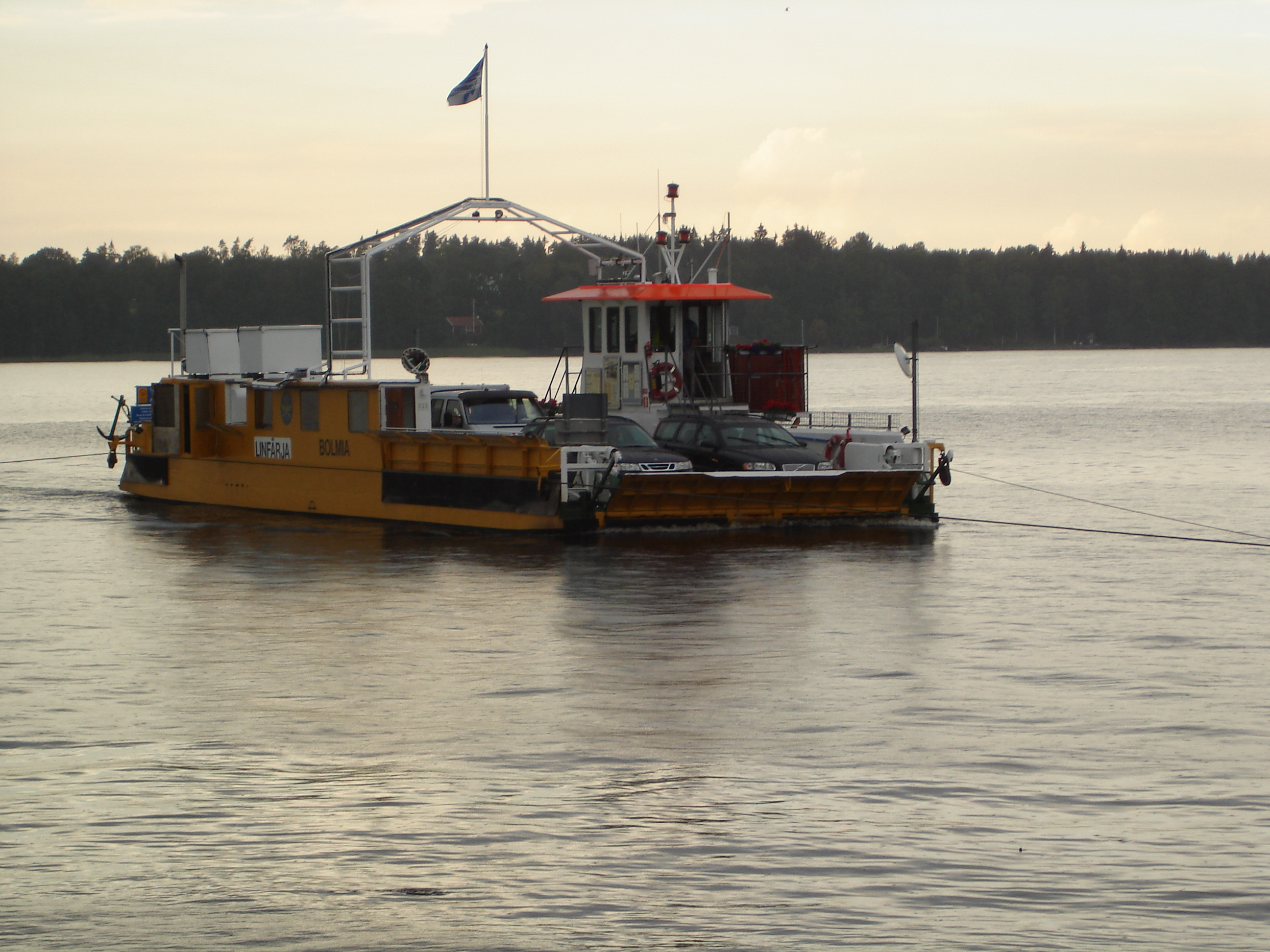 Die Seilfähre zwischen Bolmsö und Sunnaryd